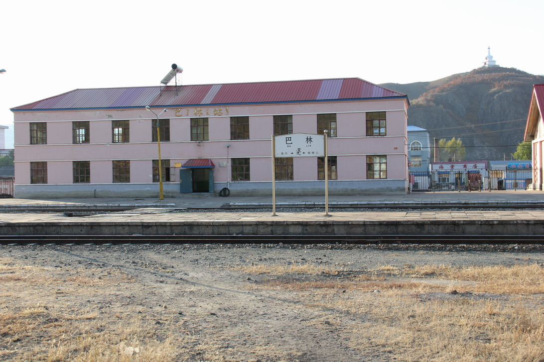 巴林站内 QQ696847